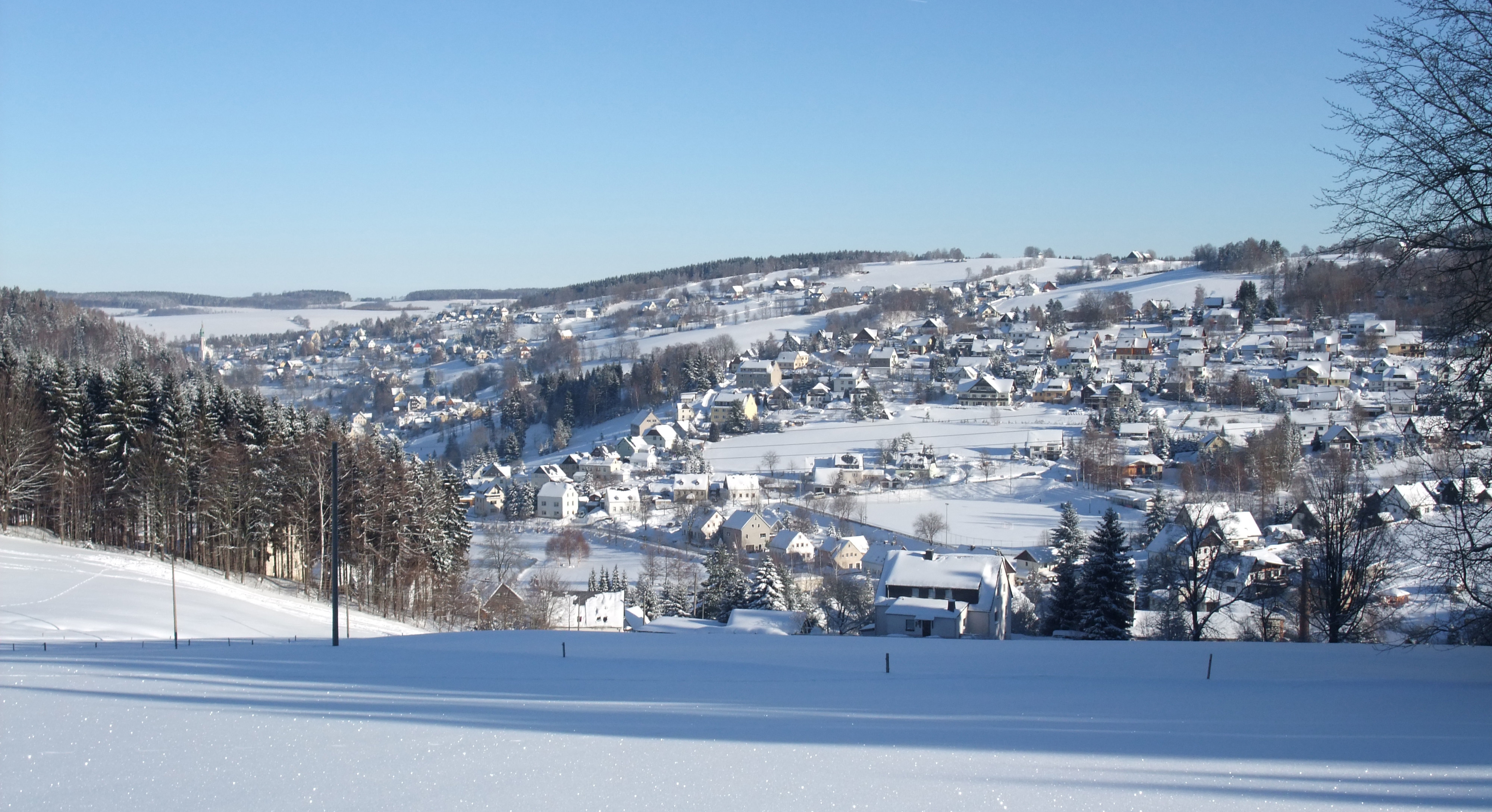 Die Amtsseite (Ortsteil östlich der Dorfstraße) in Pobershau vom Brettmühlenweg (Gebirge) gesehen.